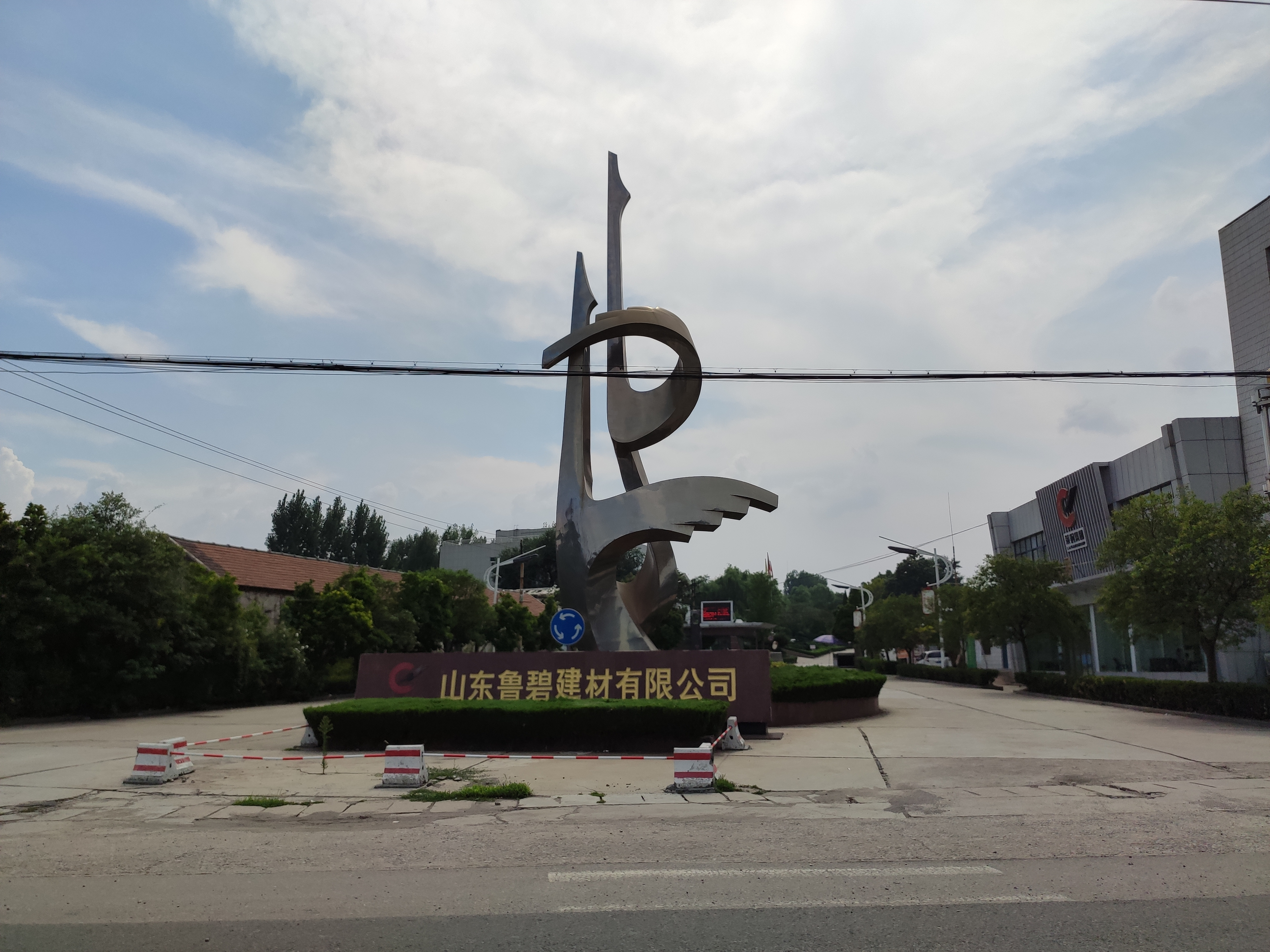 山东鲁碧建材公司东门